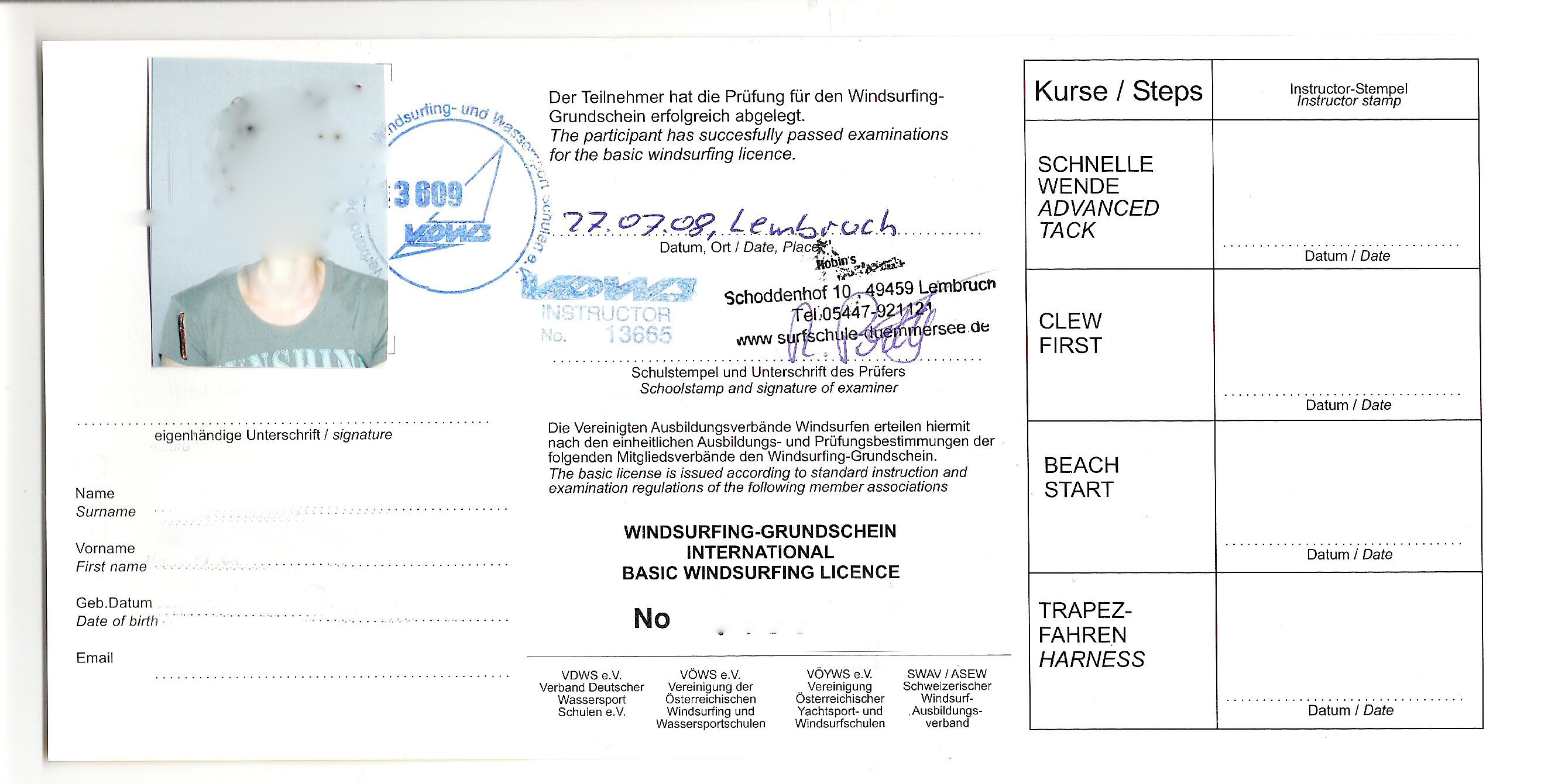 Windsurfing Schein